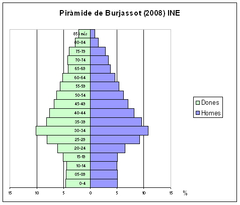 Piràmide de Burjassot. Font: INE